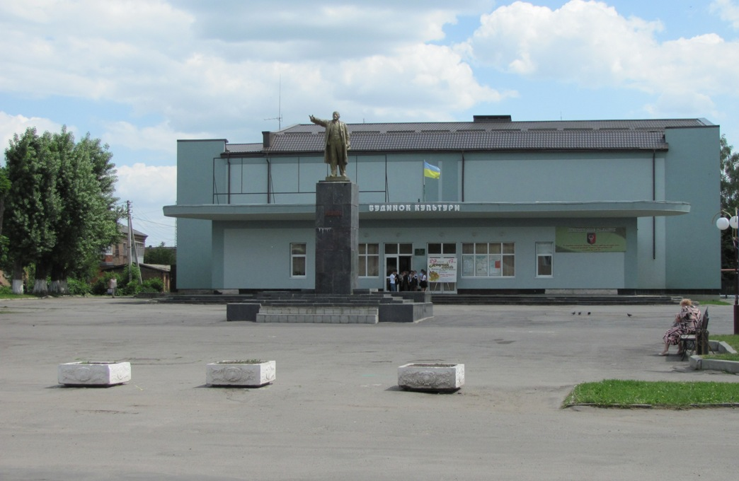 Центральная площадь Казатина. На заднем плане - бывший кинотеатр "Мир", сейчас городской ДК.